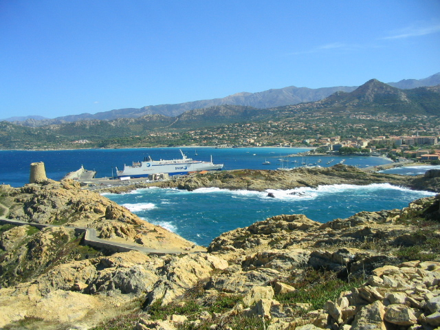 Vue de l'Ile Rousse